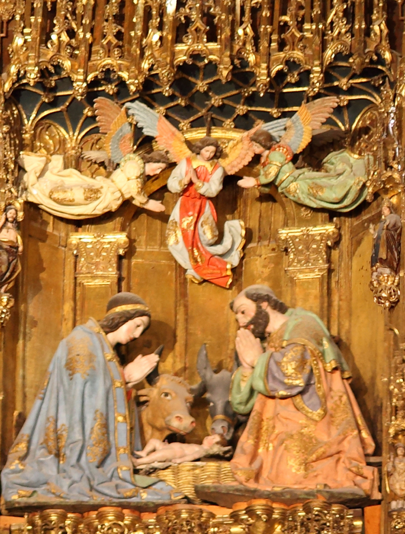 Natividad, detalle del retablo mayor de la catedral de Toledo (España)